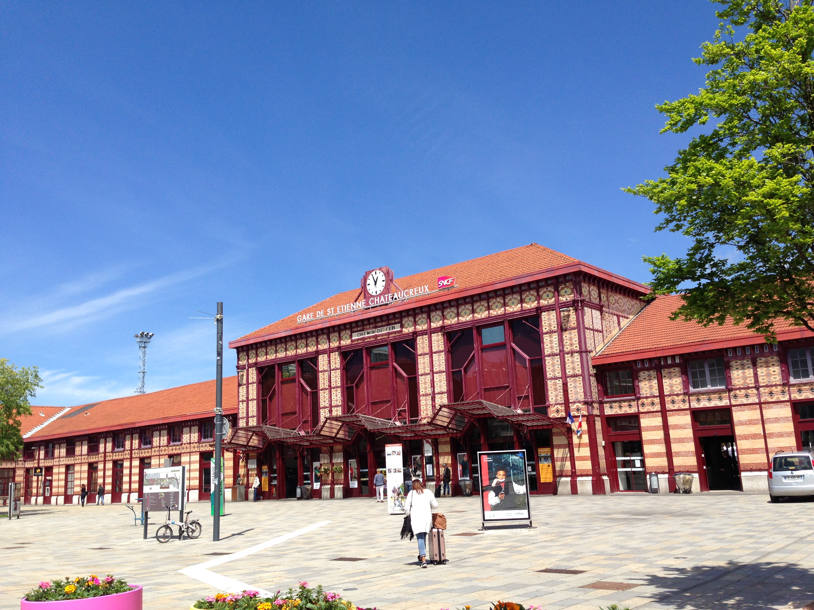 gare de Saint-Etienne-Châteaucreux en 2017